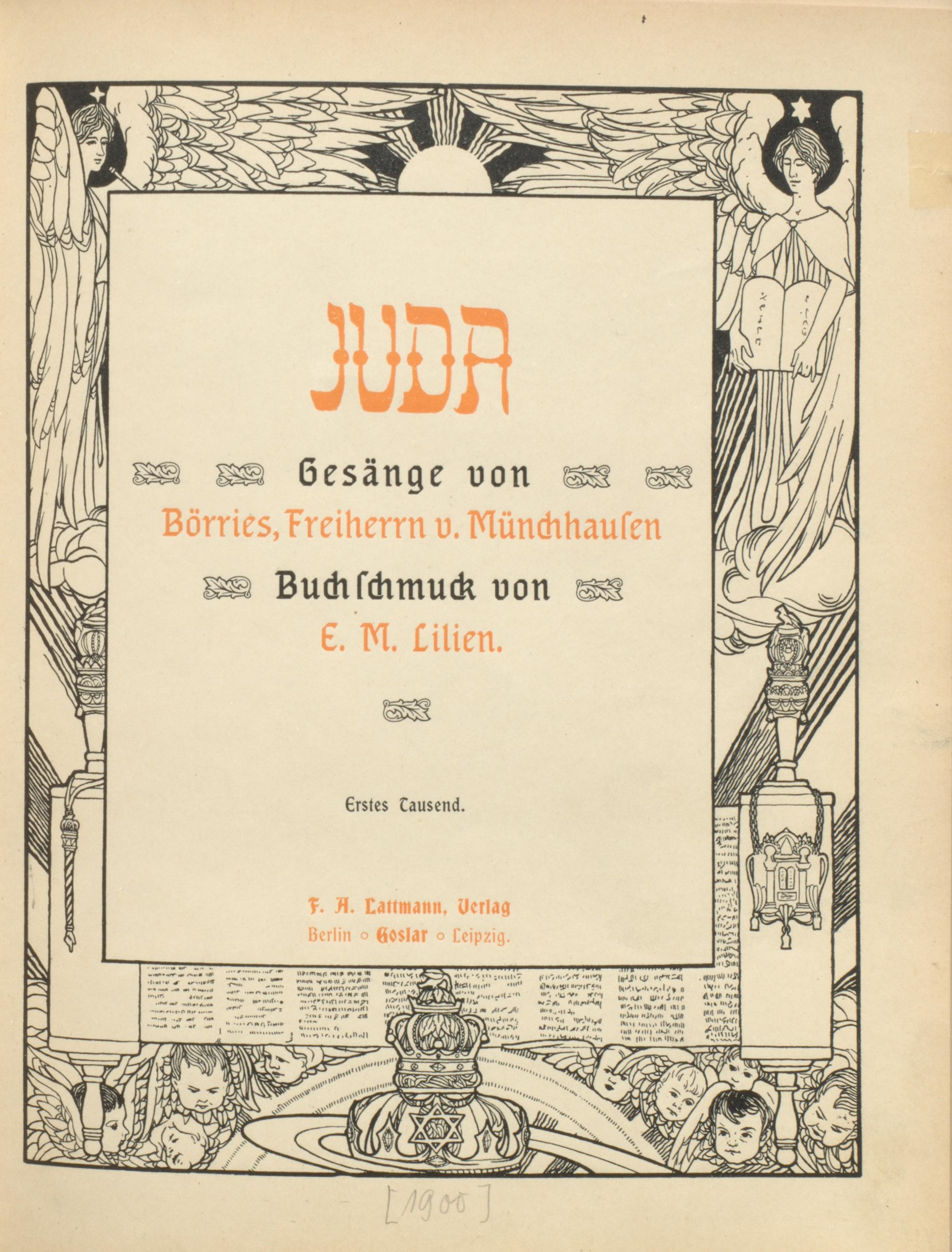 Ephraim Moses Lilien Juda Titel